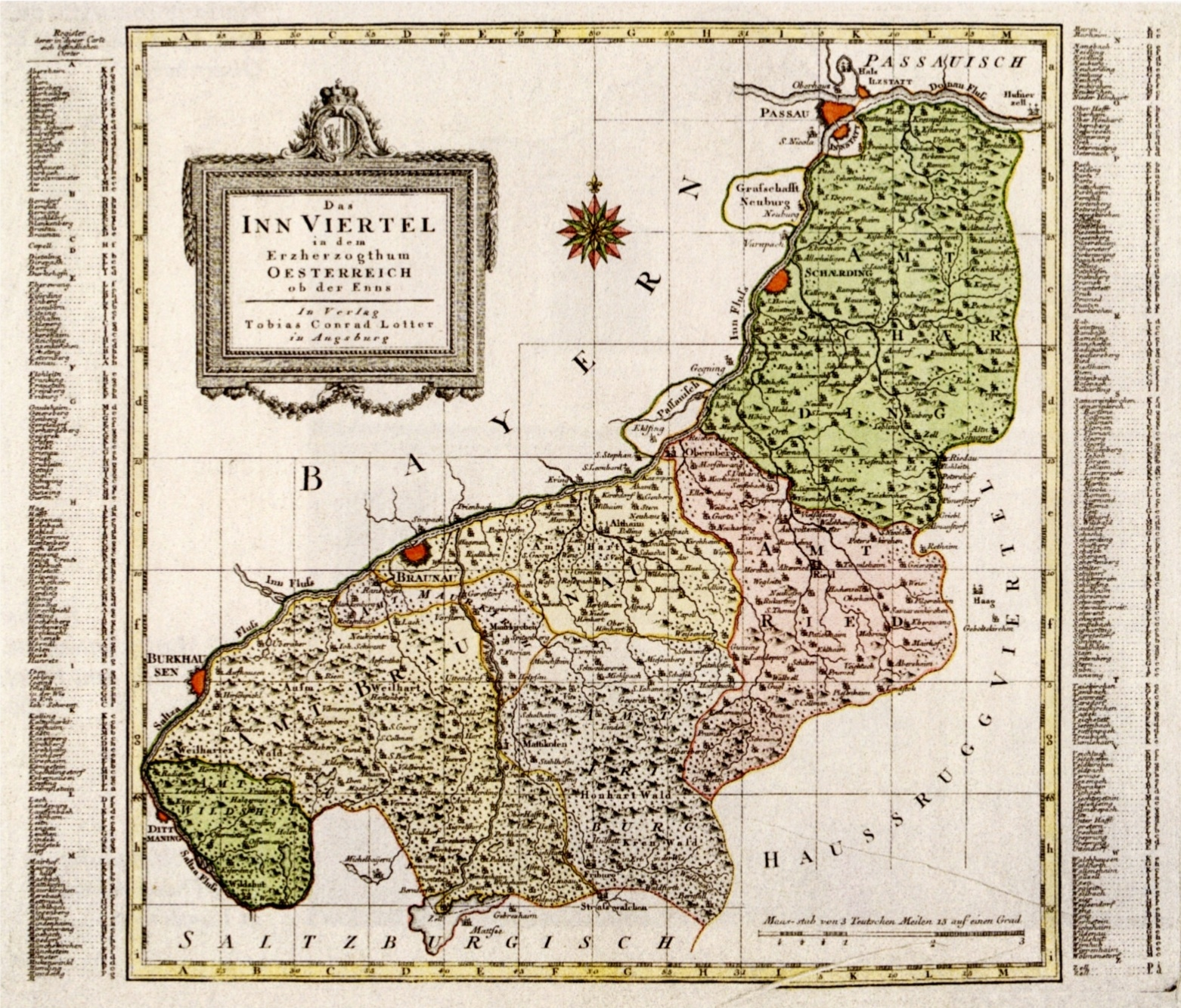 Historische Karte des oberösterreichischen Innviertels (Verlag Tobias Conrad Lotter, Augsburg 1779)